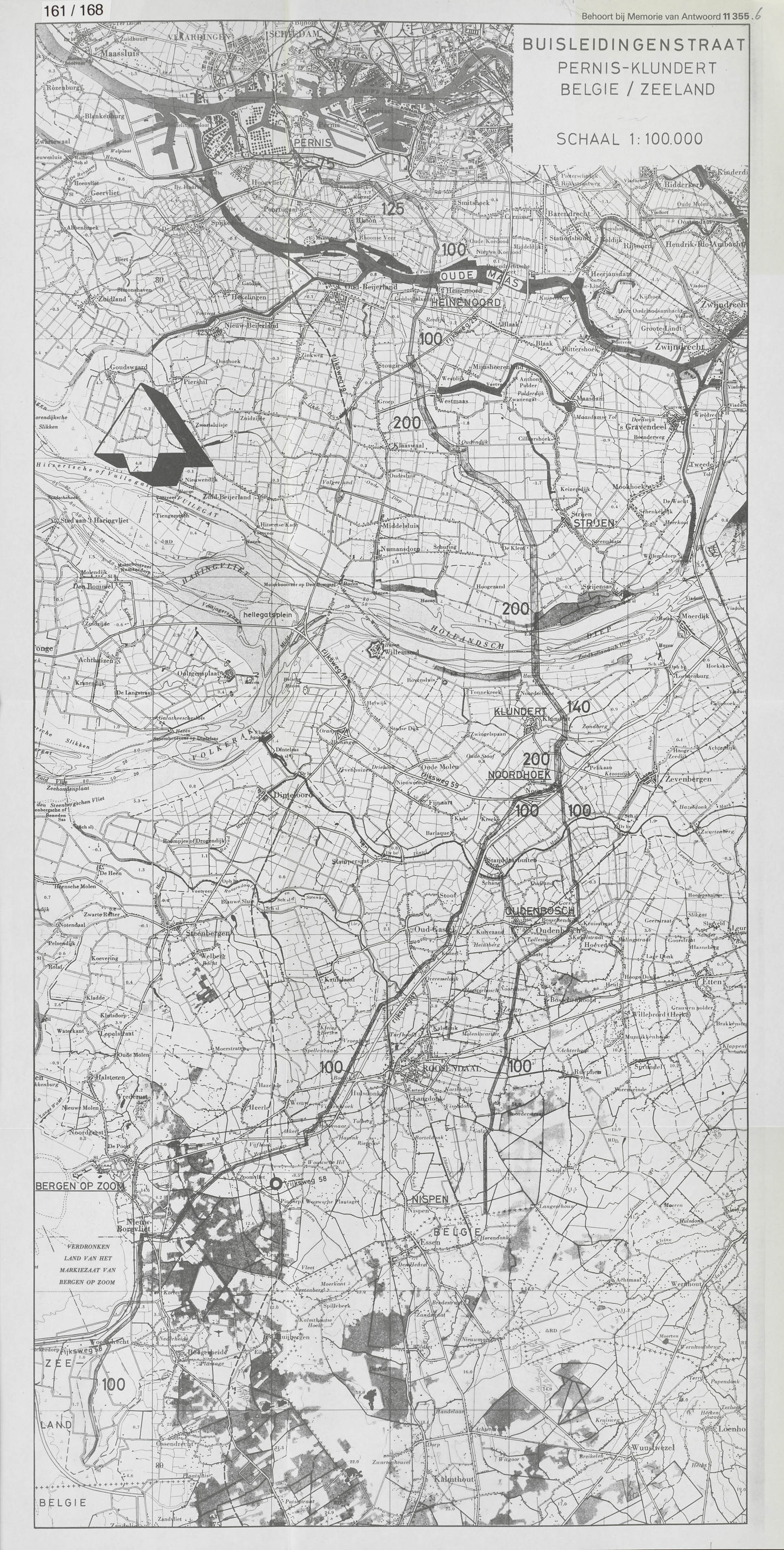 Op de kaart zijn op een aantal lokaties diverse trac's ingetekend, die nader worden uitgewerkt in de nota naar aanleiding van het eindverslag. Verder geven de getallen op de kaart waarschijnlijk een indicatie van de dikte van de buisleiding ter plaatse Behoort bij de nota naar aanleiding van het eindverslag 11355